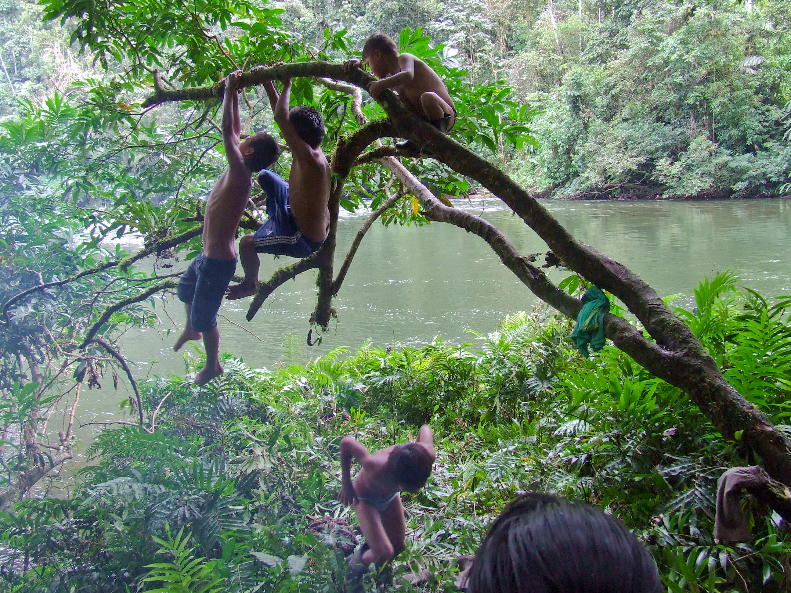 Shuar Kinder spielen am Fluss